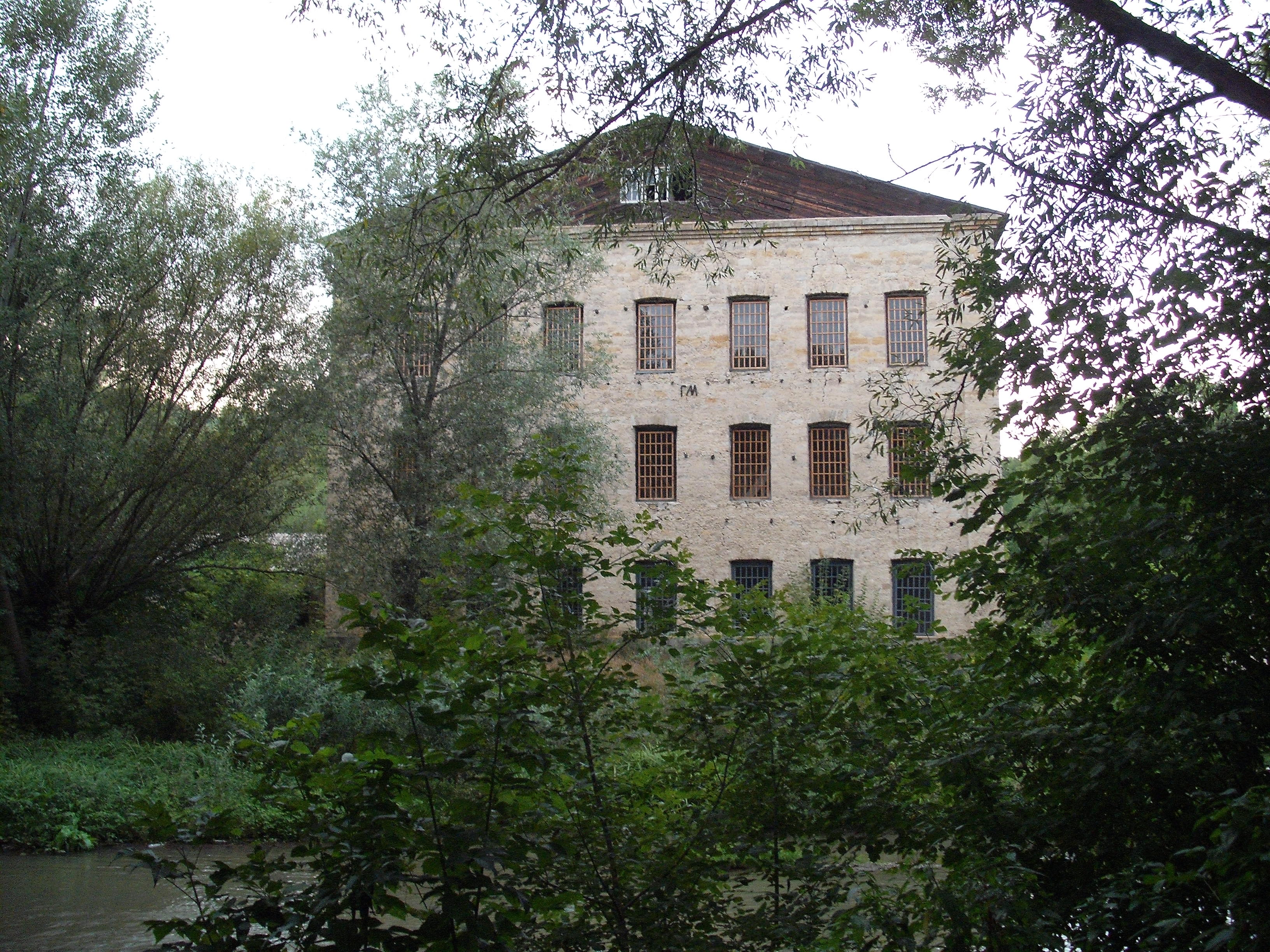 Dawny młyn w Prytulivce